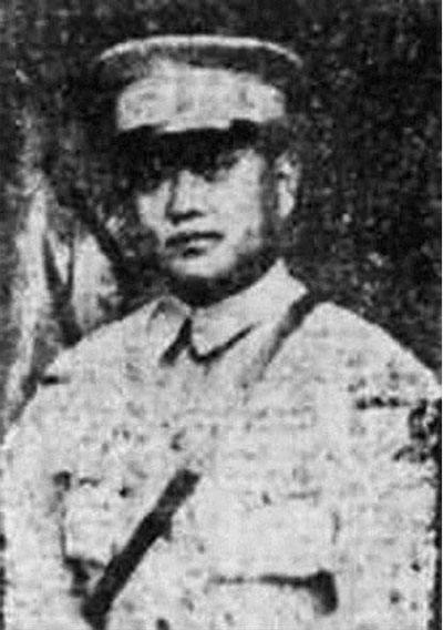 中文（中国大陆）: 国民革命军陆军第19路军吴淞要塞司令部参谋长滕久寿。